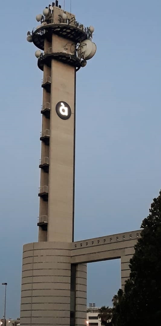 Torre del Centro de Producción de Programas de À Punt Mèdia en su sede de Burjassot.